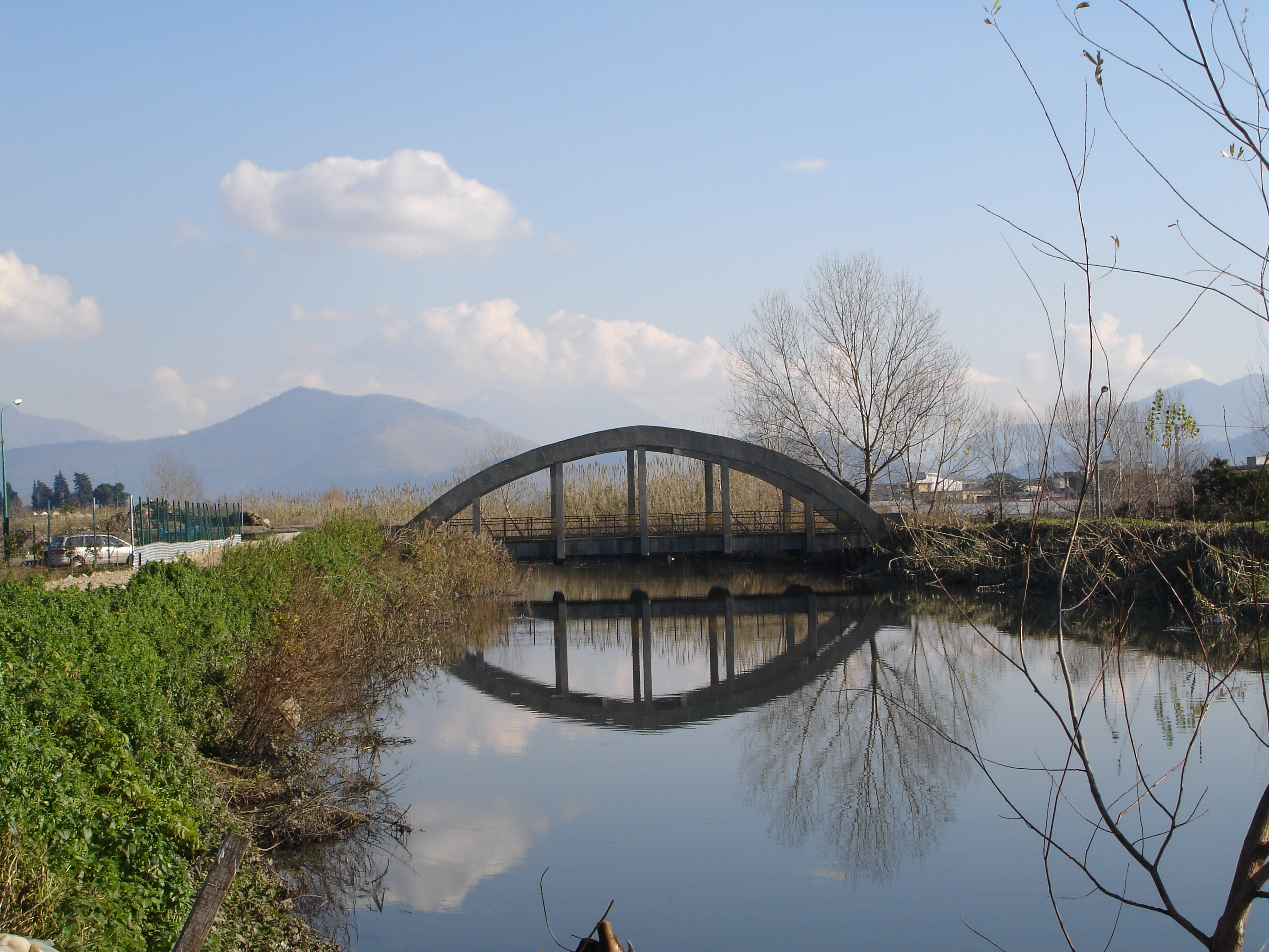 Ponte sul fiume Sarno in Comune di San Marzano sul Sarno (Salerno)